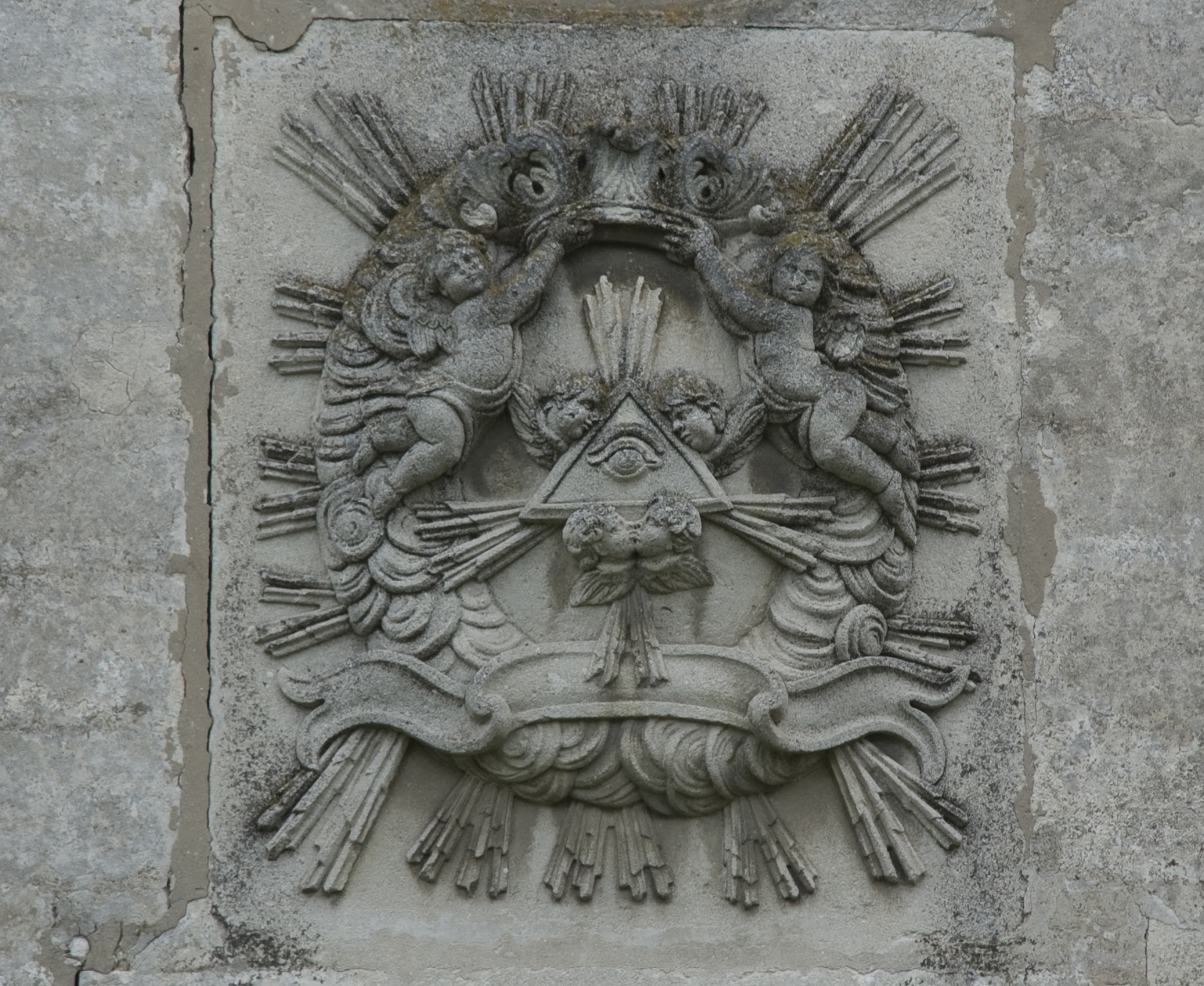 Герб на костелі в Поморянах